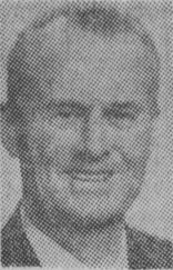 Arkitekten Bertil Hök